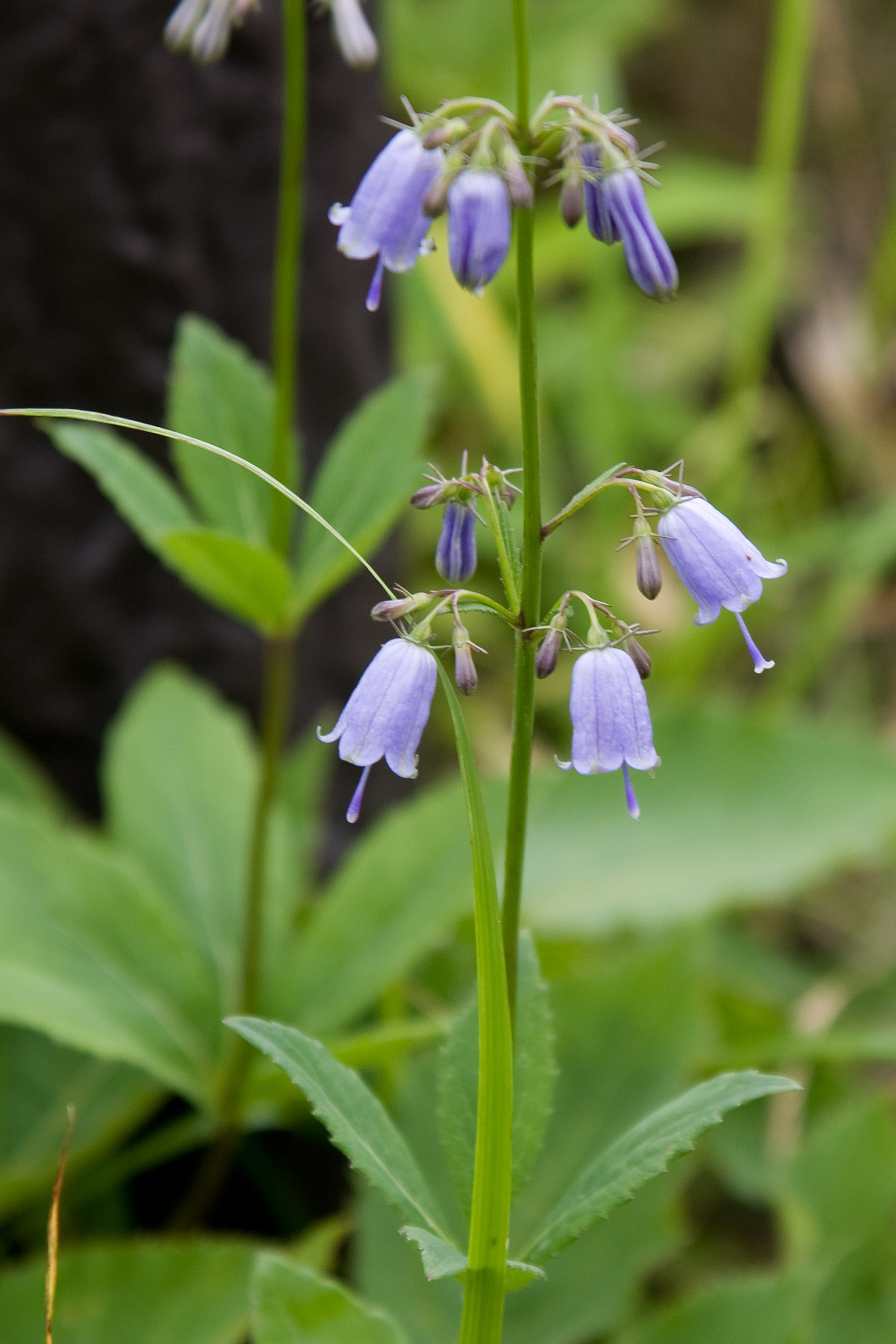 ツリガネニンジン (学名：Adenophora triphylla var. japonica）